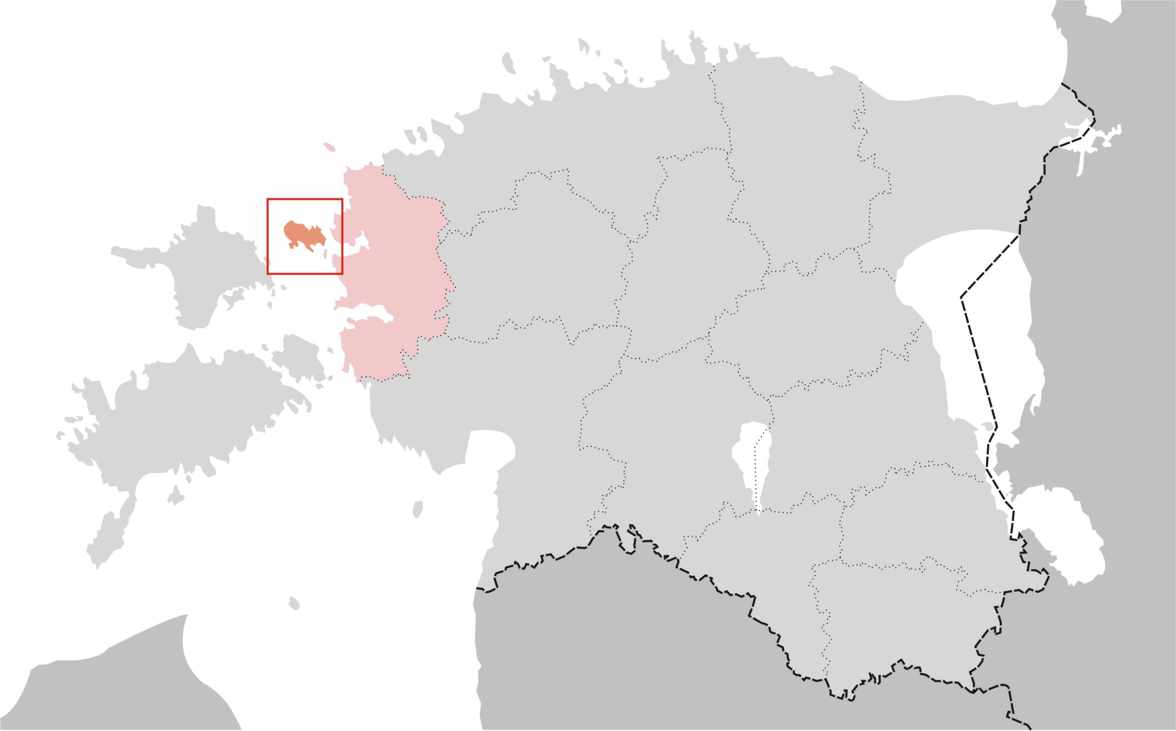 Quelle: selbst erstellt Lage der estnischen Insel Vormsi (Worms) Verfasser: varp